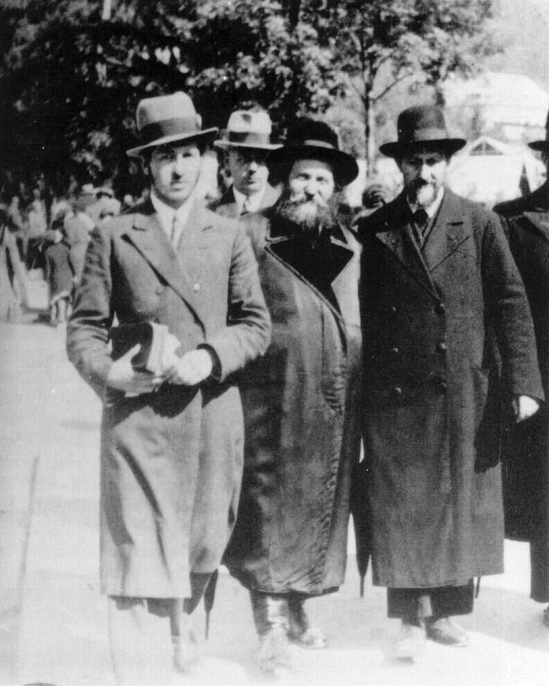 עם הגאון הרב מבריסק